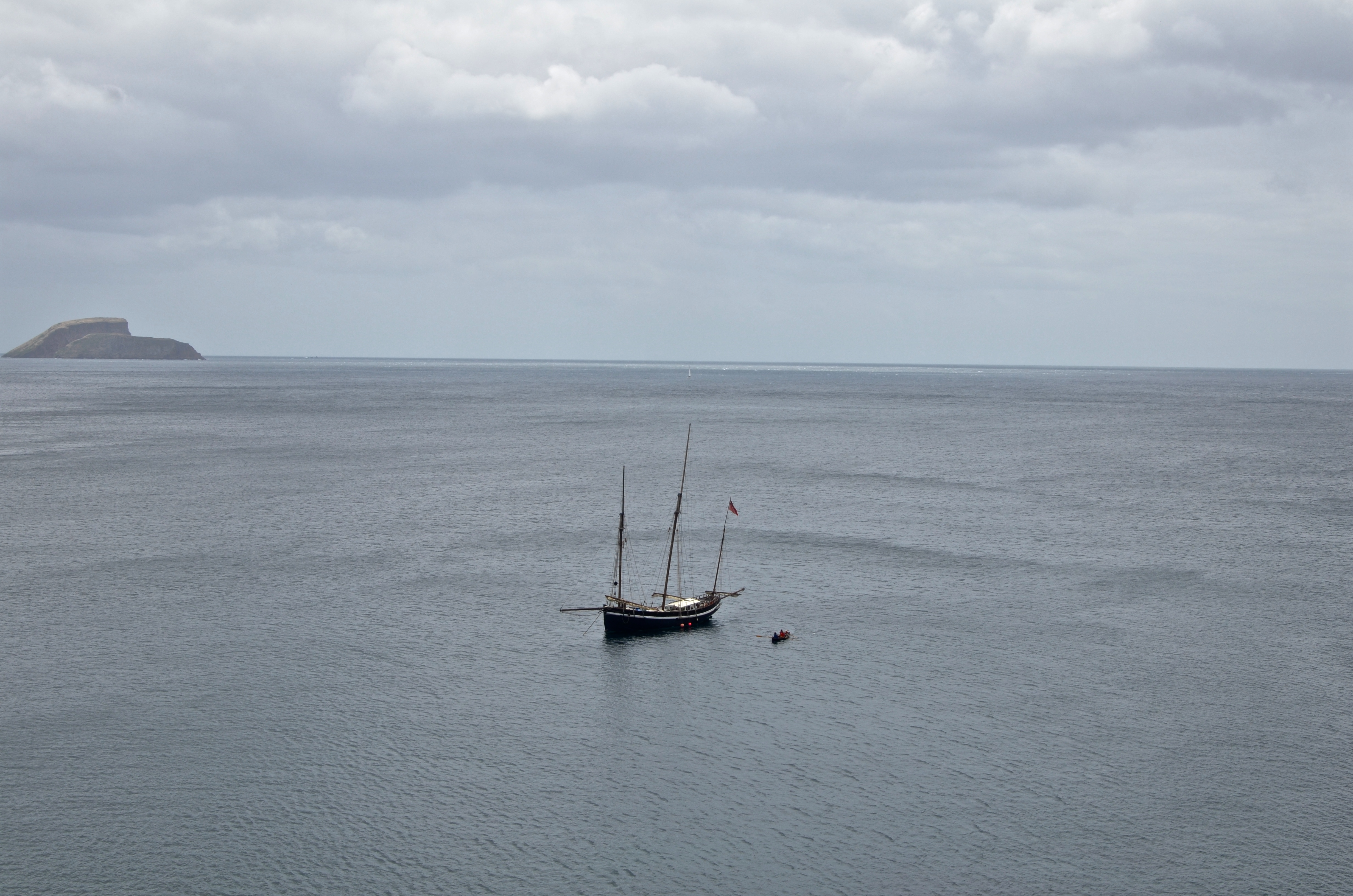 Atlântico